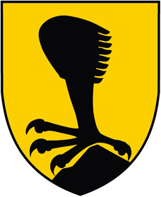 Wappen der Stadtgemeinde Villach, Kärnten